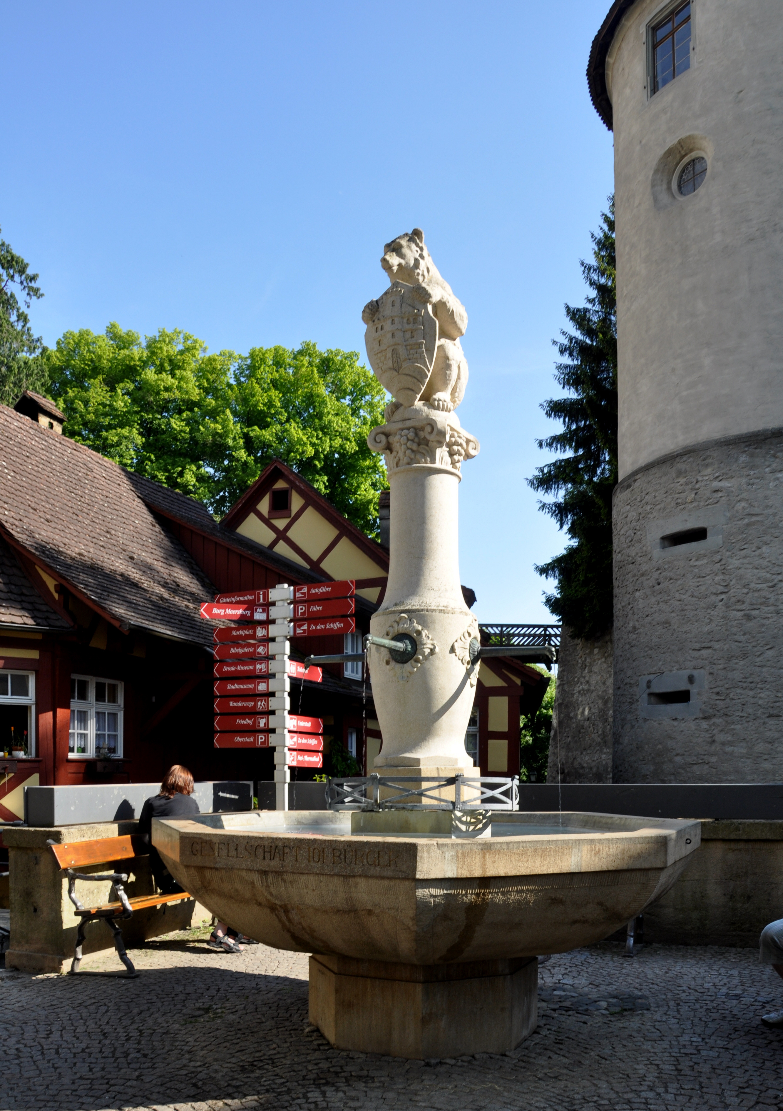 Meersburg, Bärenbrunnen in der Steigstraße mit Stadtwappen